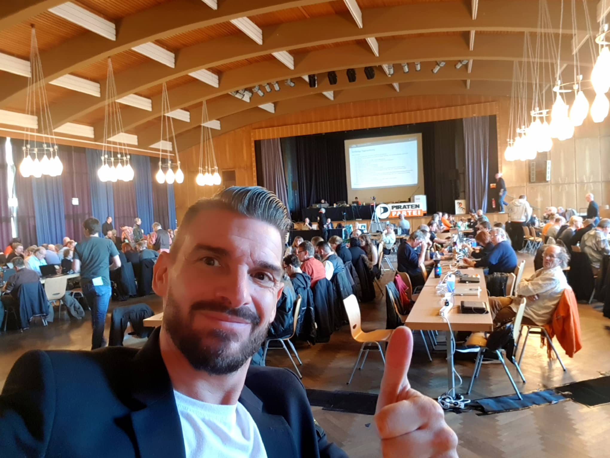 Torsten Lemmer im November 2018 auf dem Bundesparteitag der Piraten-Partei in Düsseldorf